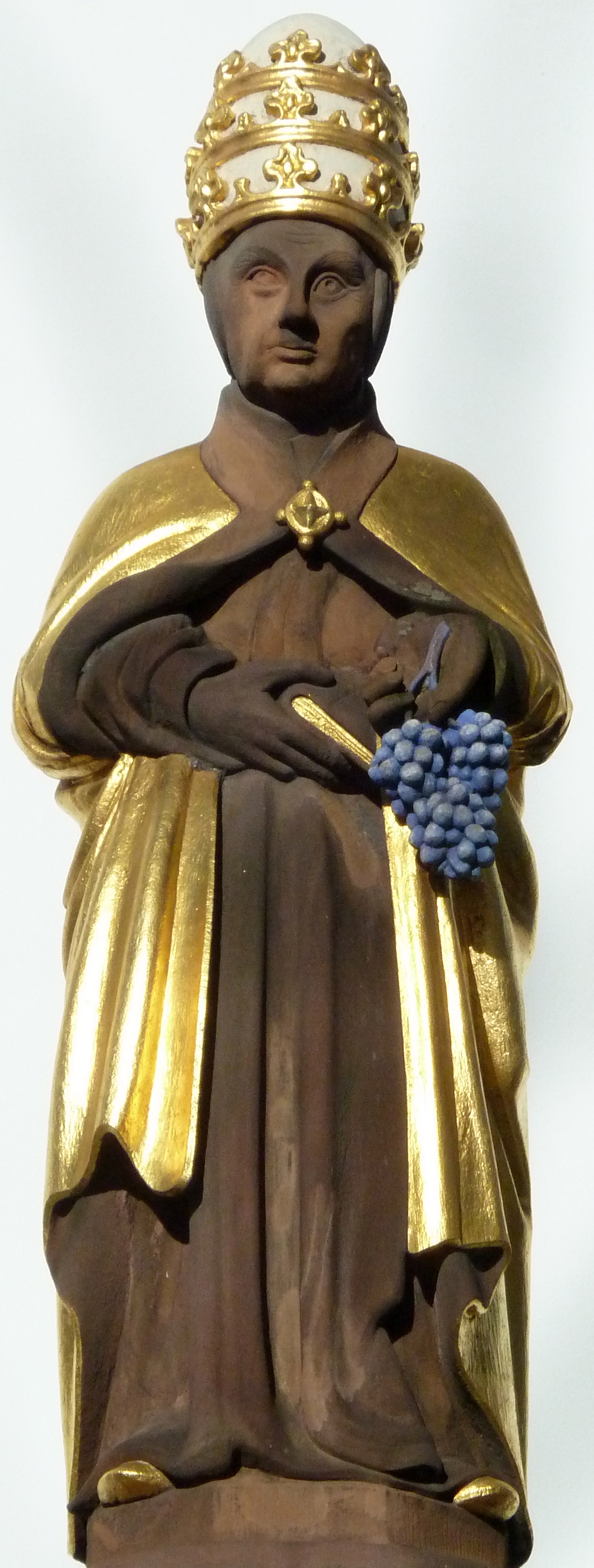 Statue des heiligen Urbans, Schutzpatron der Rebleute und Winzer (Weinleute), mit seinem Attribut der Traube, am Urbanbrunnen von Basel (Ecke Blumenrain/Petersgasse), Schweiz. Kopie vom Werk eines unbekannten Bildhauers um 1500, Sandstein, bemalt, vergoldet. Die originale Brunnenstockstatue befindet sich in der Barfüsserkirche, Historisches Museum Basel.